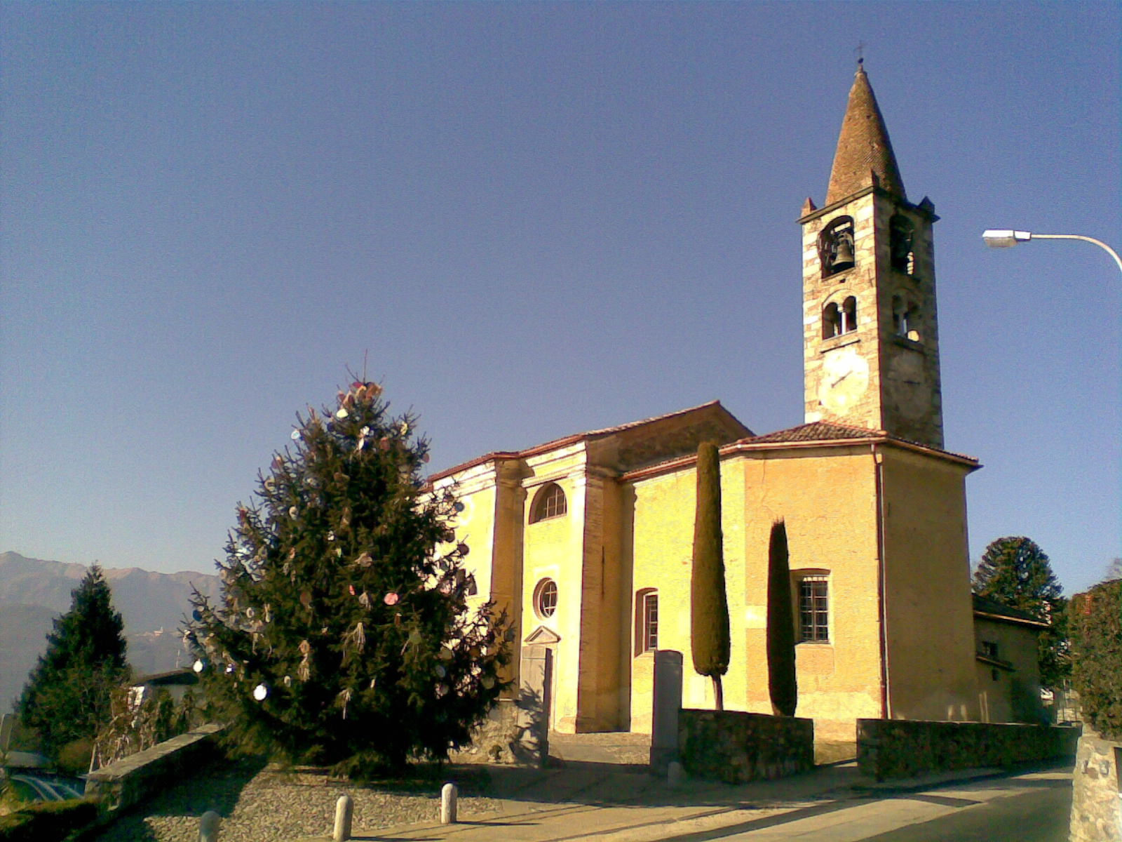 Chiesa parrocchiale di Santa Maria della Purificazione a Comano